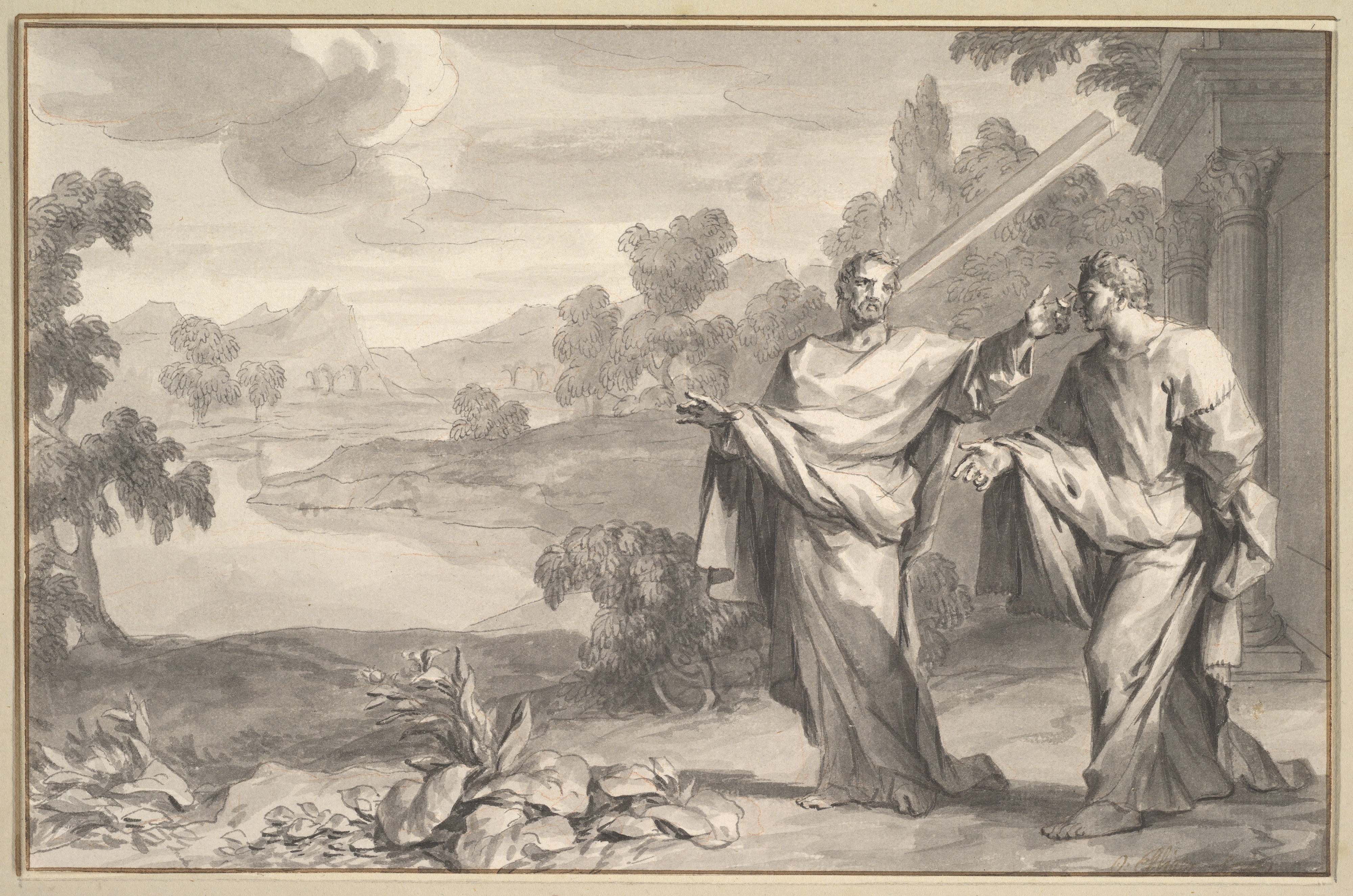 Drawing; Drawings